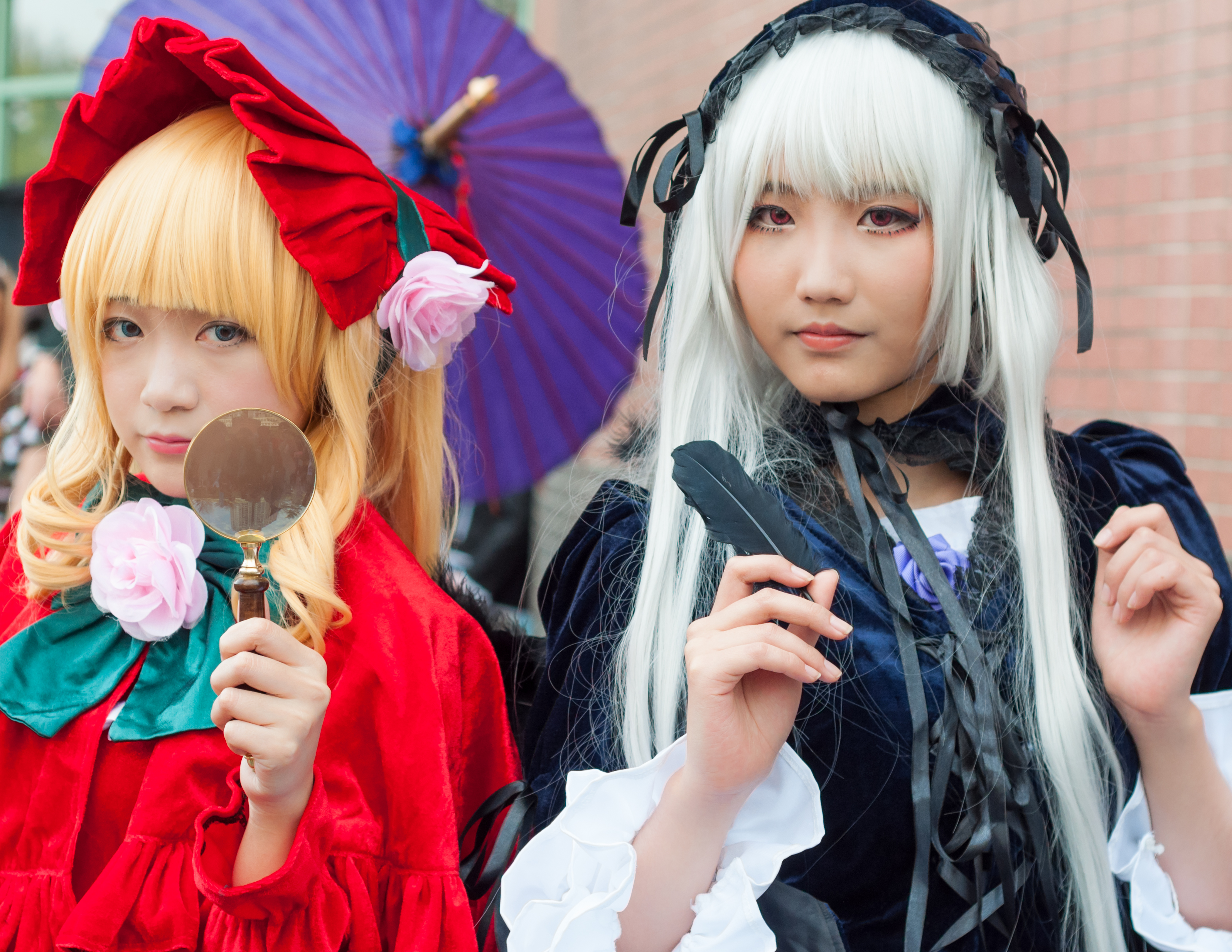 第23屆開拓動漫祭，《薔薇少女》真紅（左）、水銀燈（右）cosplayer。